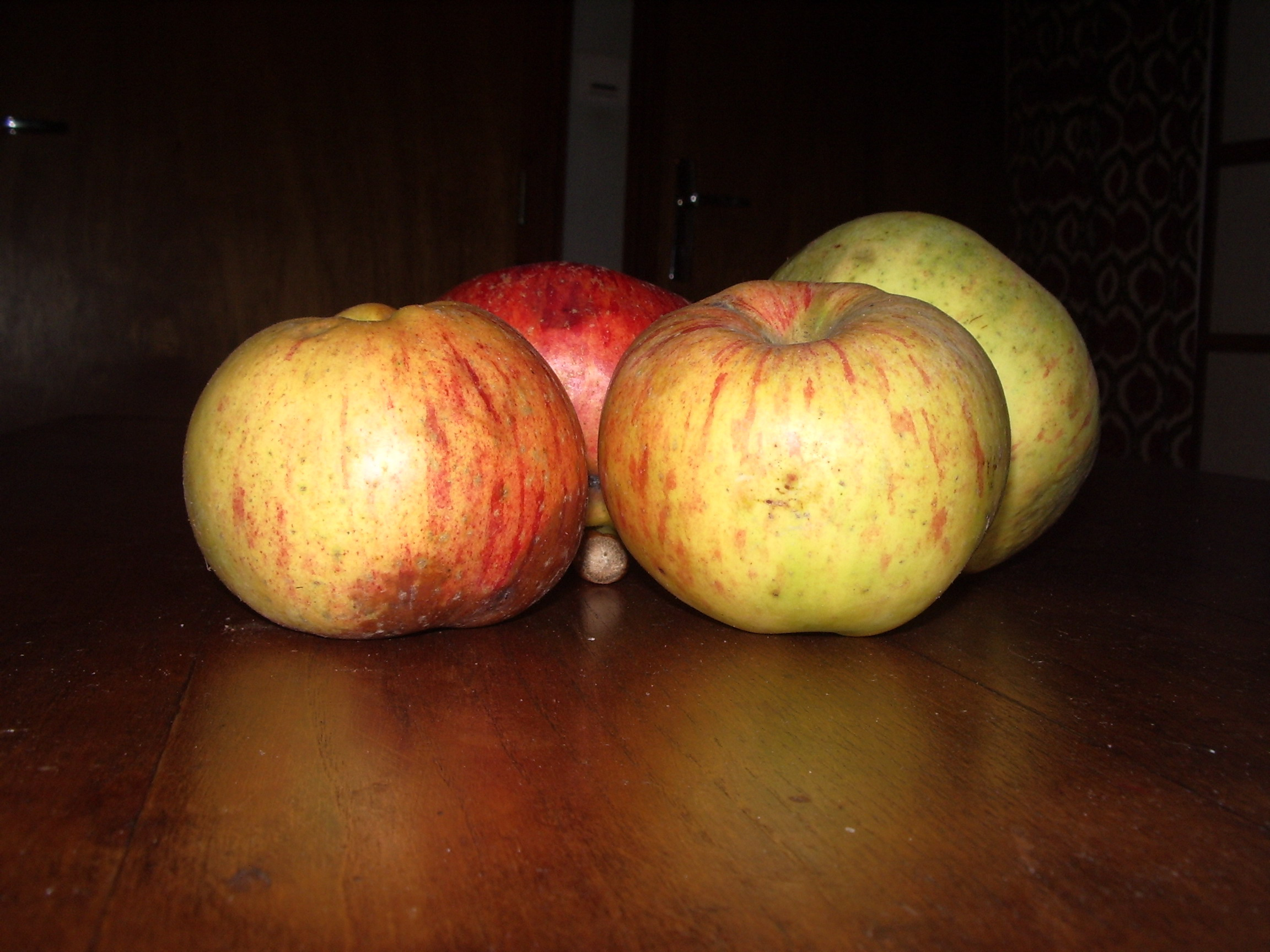 Sans Pareil de Peasgood, une noisette au milieu est censée relativiser la taille.